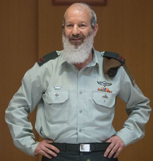 תא"ל הושע בן שלום